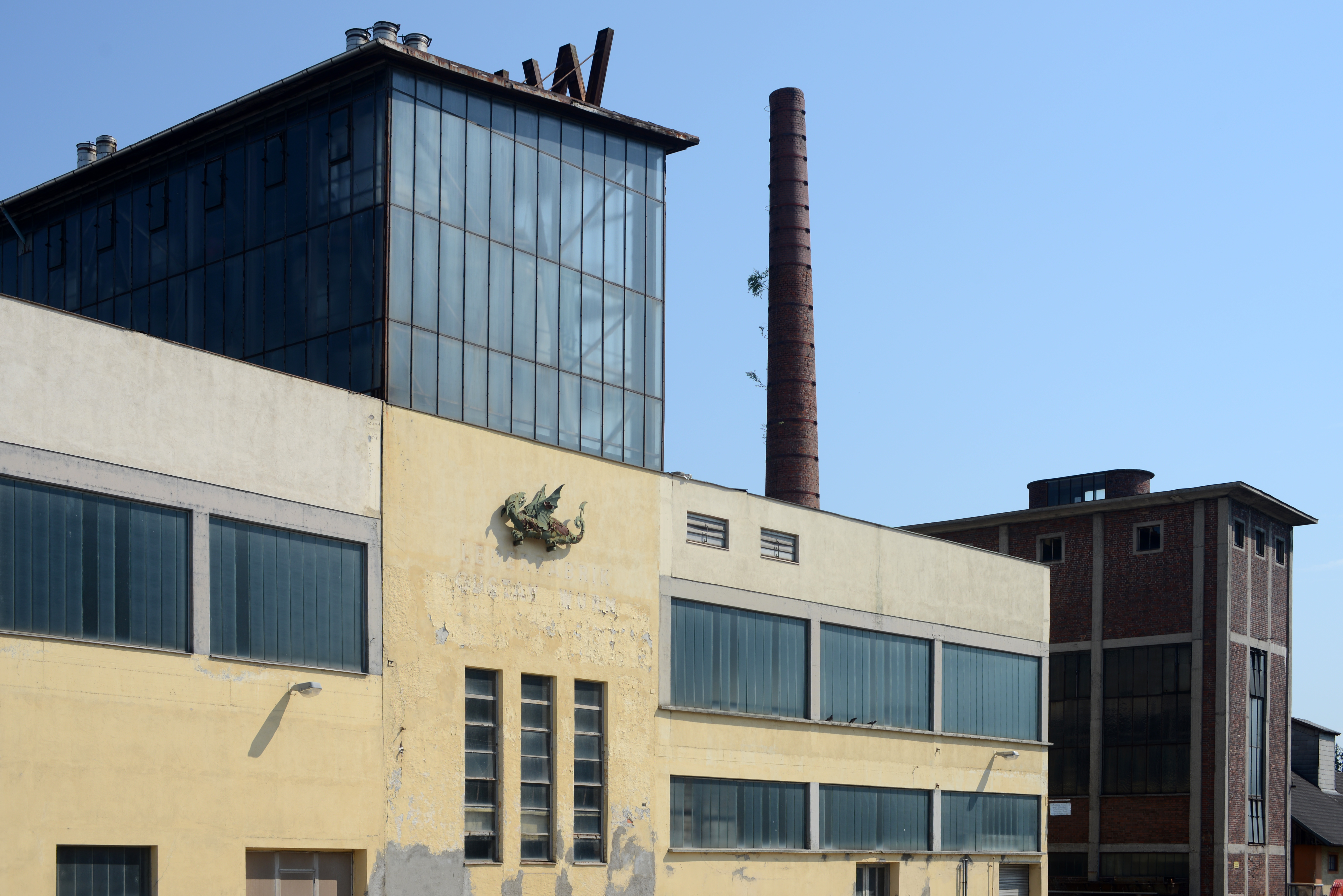 Drache (Lindwurm) an der Außenmauer der Lederfabrik Wurm in Neumarkt im Hausruckkreis.